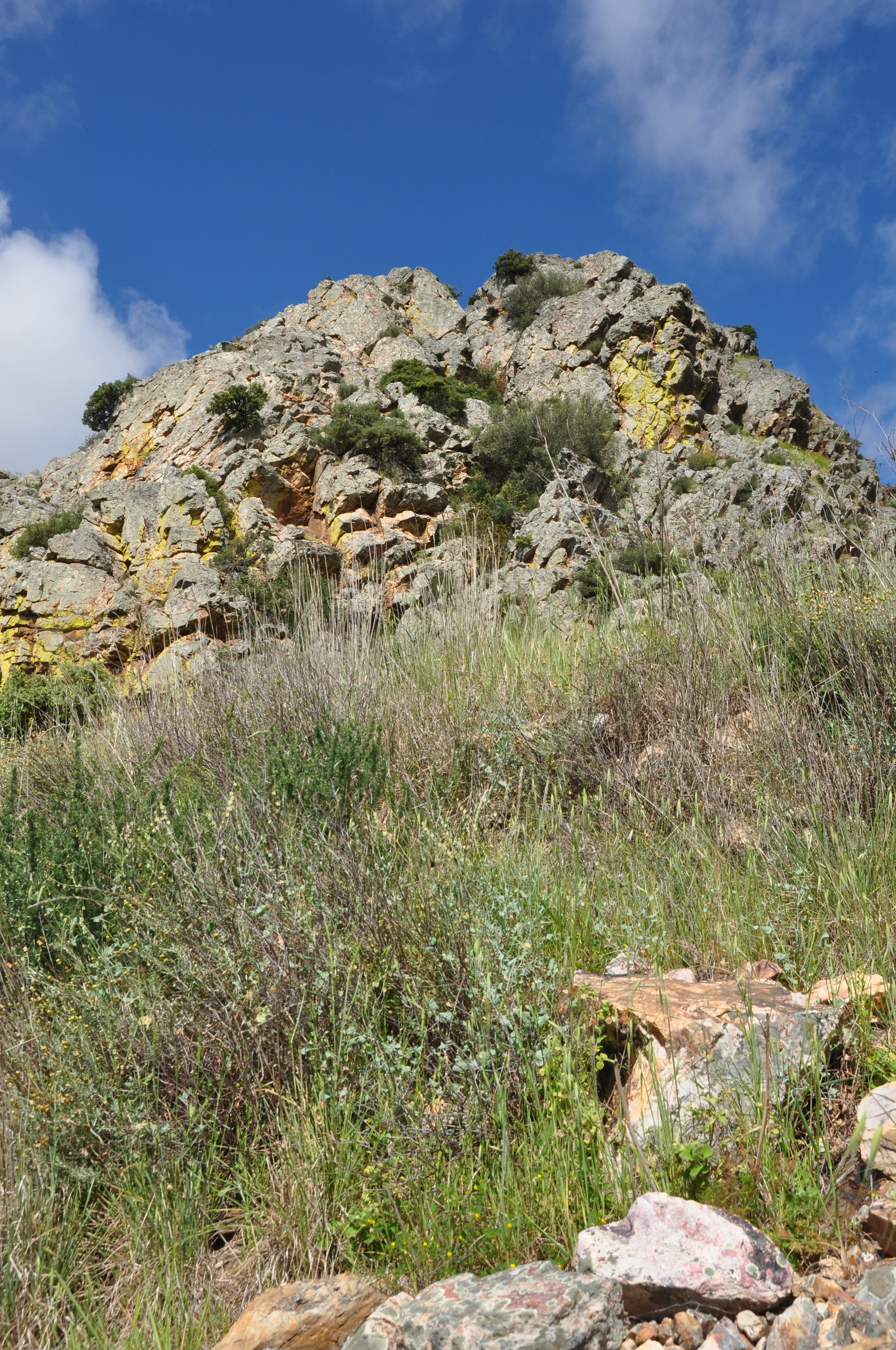 Sierra Grande de Hornachos This is a photography of a Special Area of Conservation in Spain with the ID: ES0000072. Natura2000 entry, EEA entry